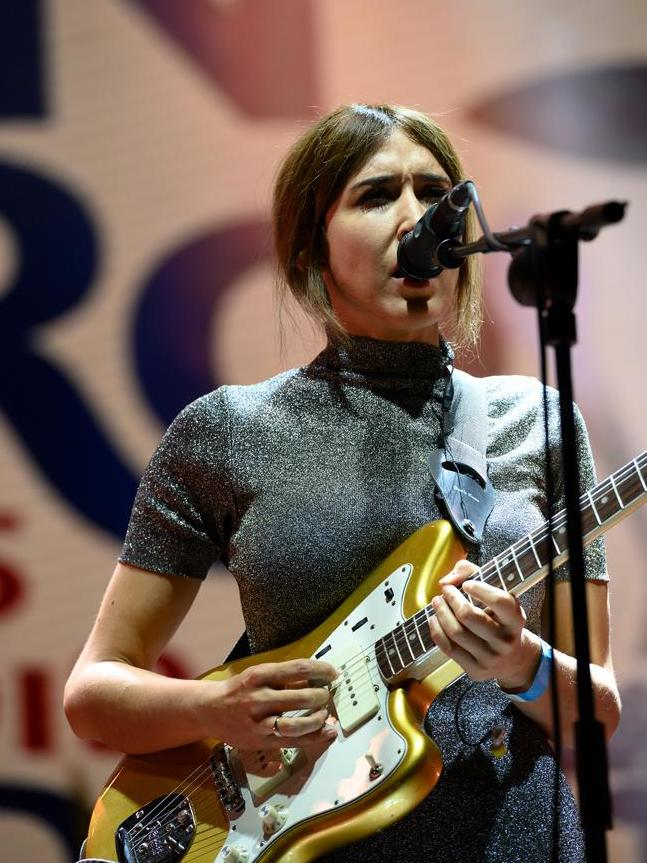 La música volvió a ser la protagonista ayer martes, 14 de mayo, de la programación de San Isidro, con propuestas de los más variados estilos, desde el proyecto Belenciana, que puso a bailar a varias generaciones en La Pradera, a la gran dama del indie español, La Bienquerida, que mostró su último trabajo, Fuego, en este mismo escenario, o al concierto de Anni B Sweet, que volvió a brillar con luz propia dentro de universo pop, en la Plaza Mayor. Y en la Plaza de Oriente un espectáculo sobre la naturaleza submarina.